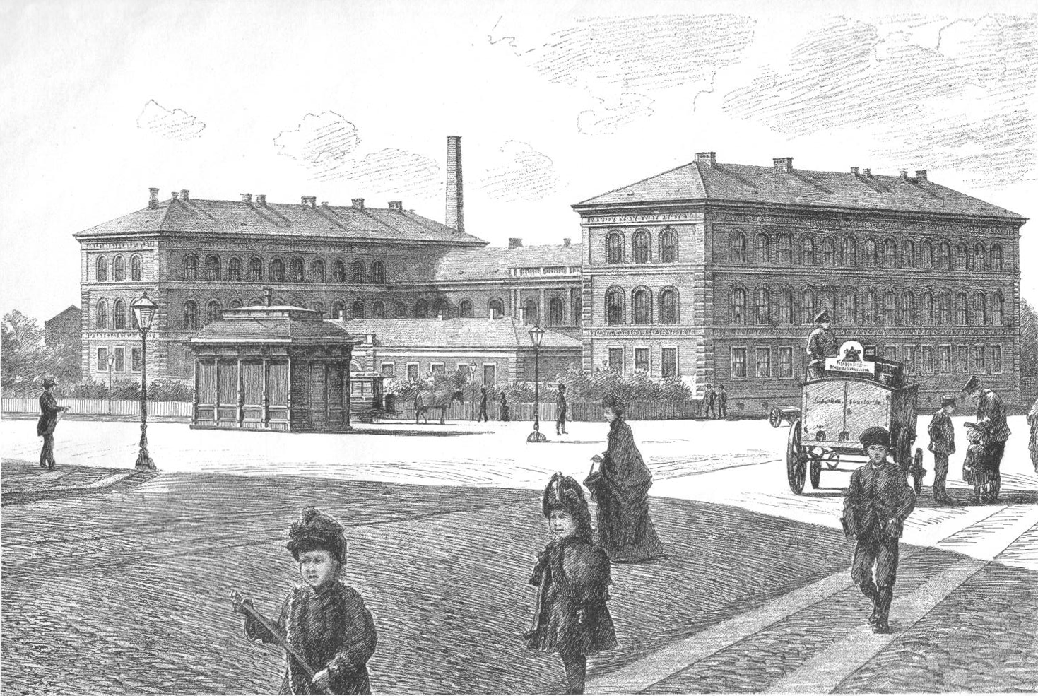 Polyteknisk Læreanstalt, opført 1887-89 efter Tegning af Herholdt.